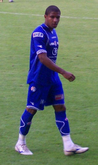 3=Jorge Sammir Cruz Campos